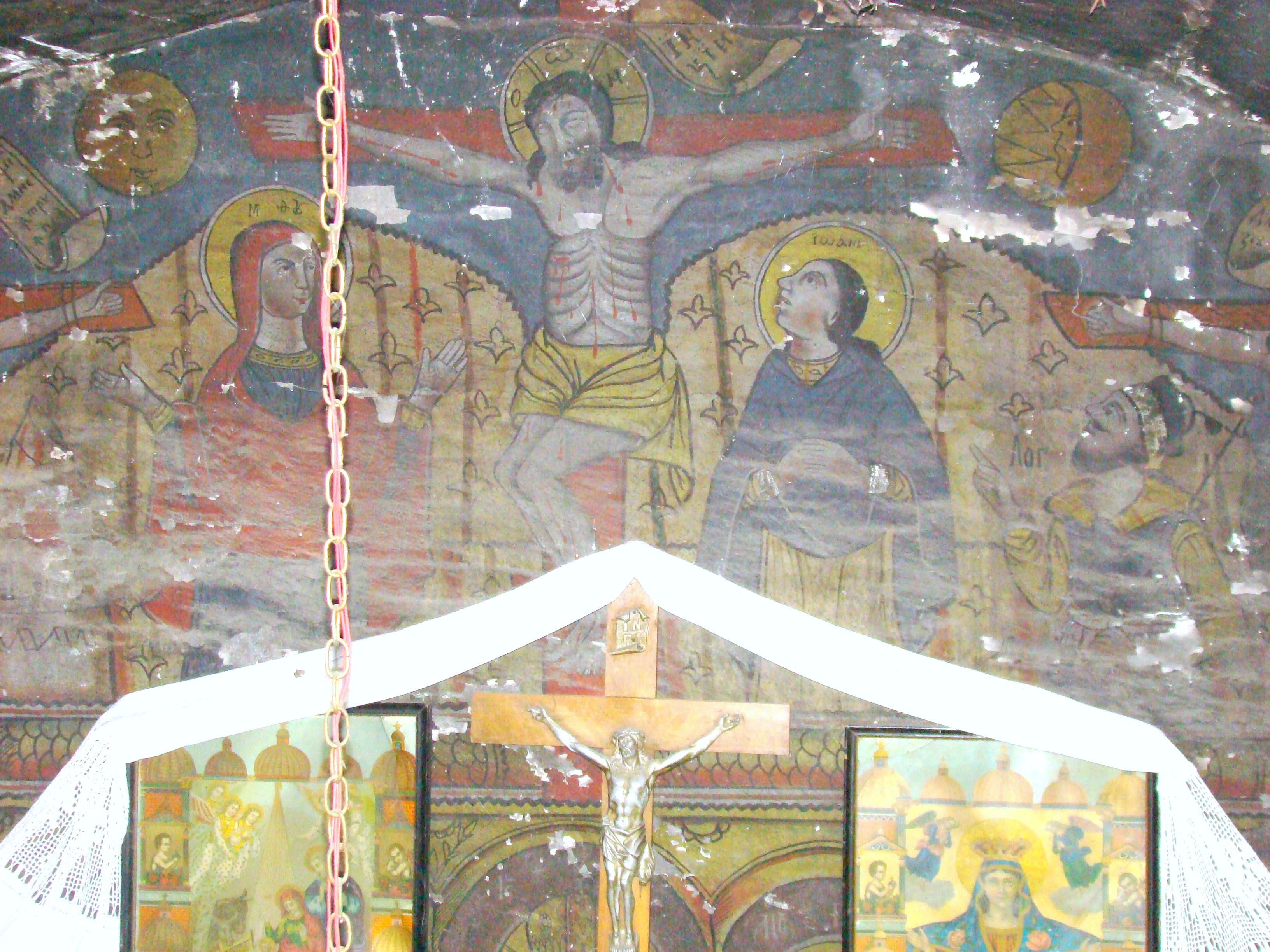 Biserica de lemn “Învierea Domnului” din Cubleșu, județul Sălaj